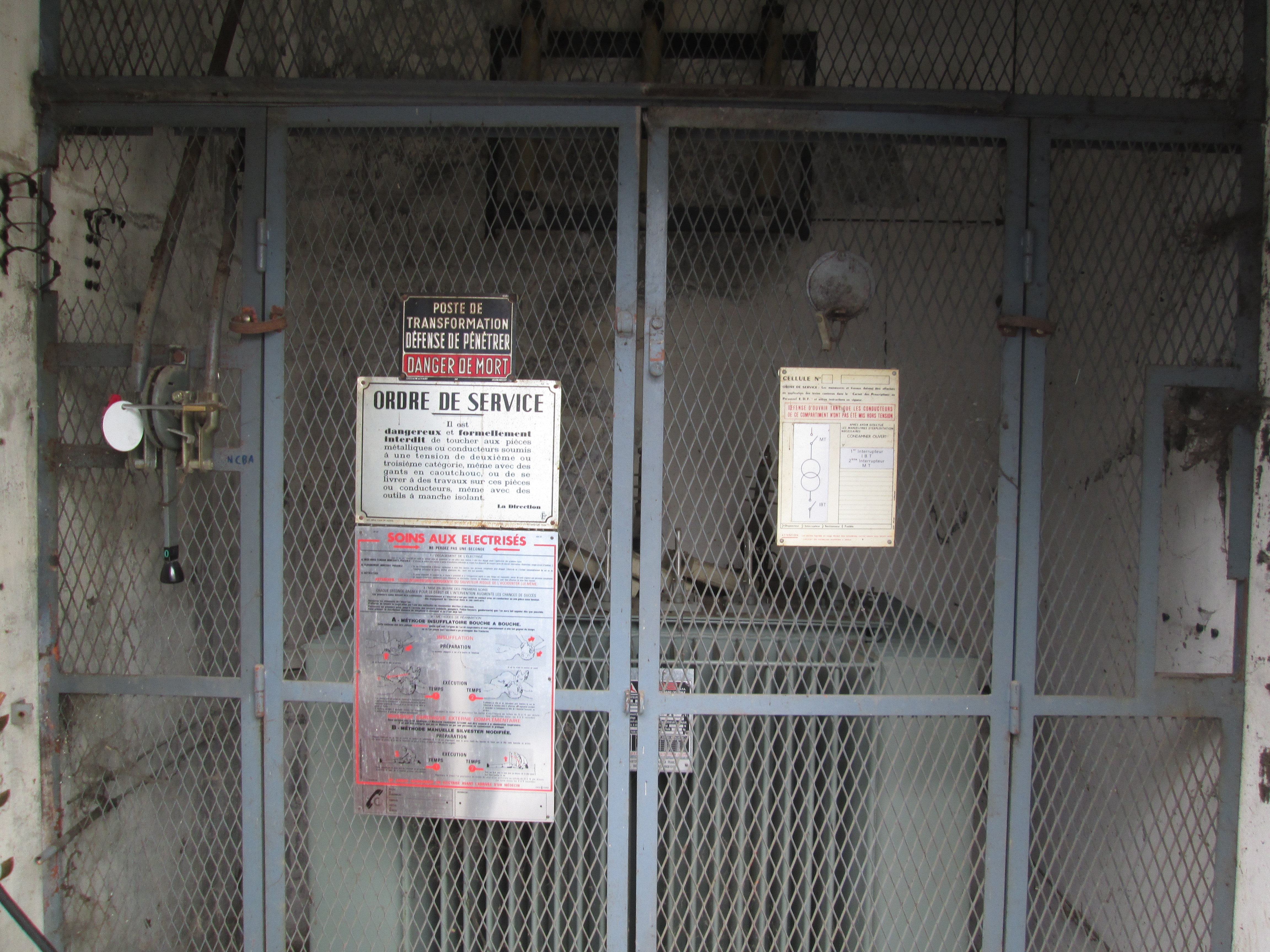 Photographie montrant la grille de protection du transformateur, à Moutiers-les-Mauxfaits.